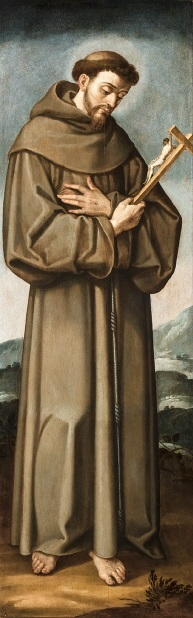 La obra representa a San Francisco de Asís, el fundador de la Orden de los franciscanos.